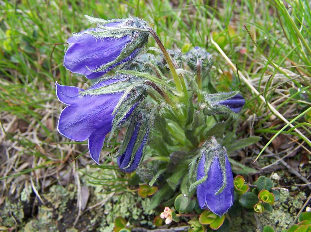 Campanula alpina (pl. dzwonek alpejski) - Tatra Mountains, Dolina Tomanowa